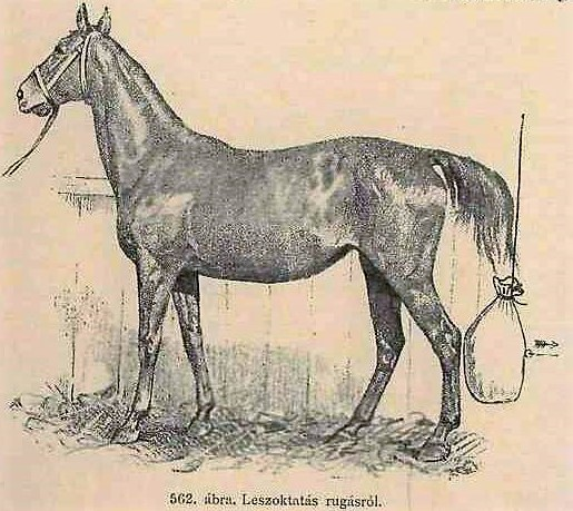 Kovácsy Béla - Monostori Károly A ló és tenyésztése 312. oldal 562. ábra Leszoktatás rugásról